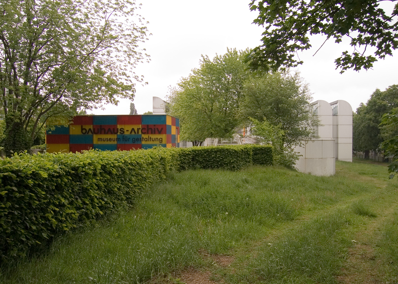 中文（中国大陆）: 包豪斯博物馆